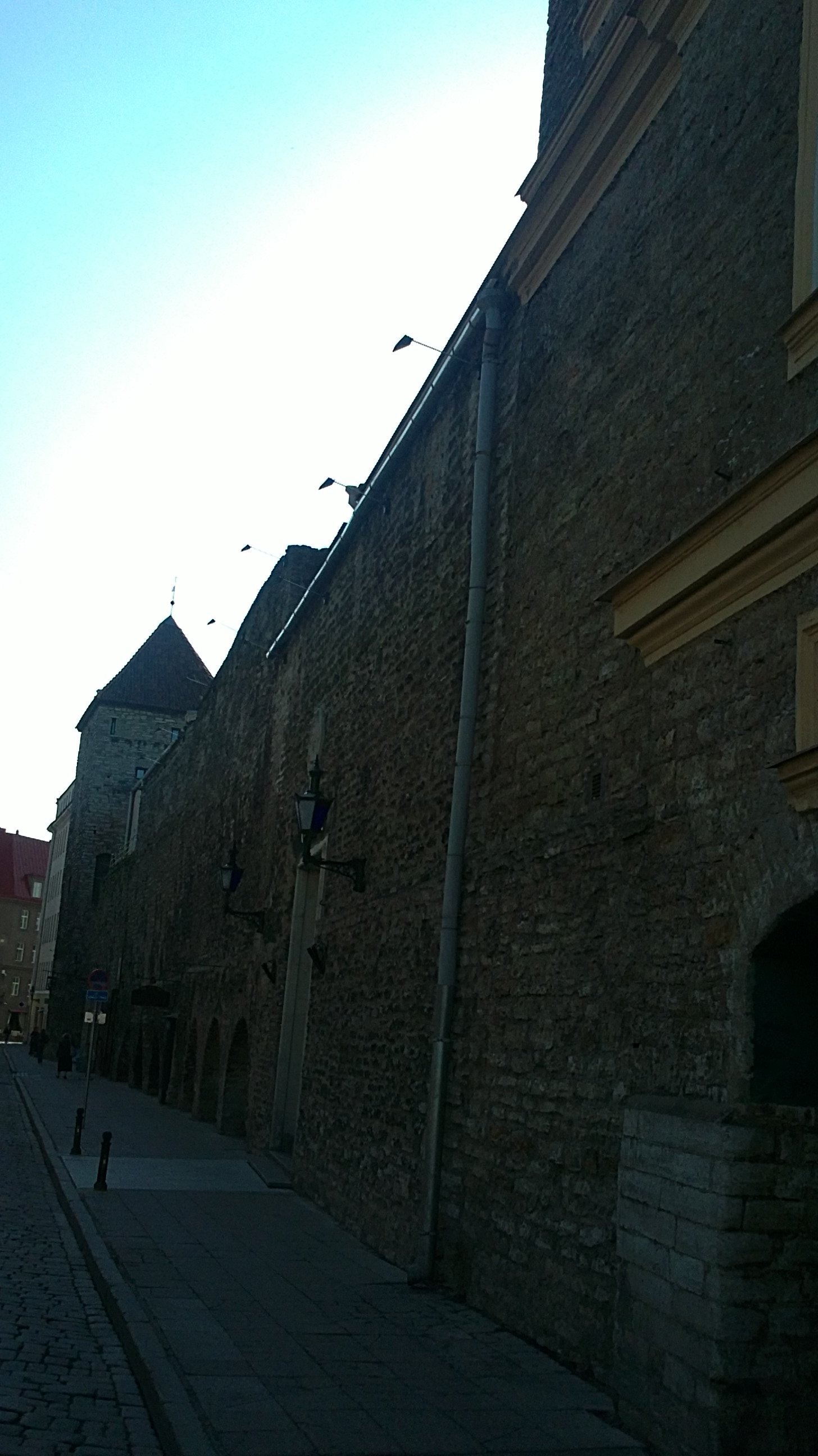 Tallinna linnamüür ja Assauwe kaitsetorn, Müürivahe tänaval